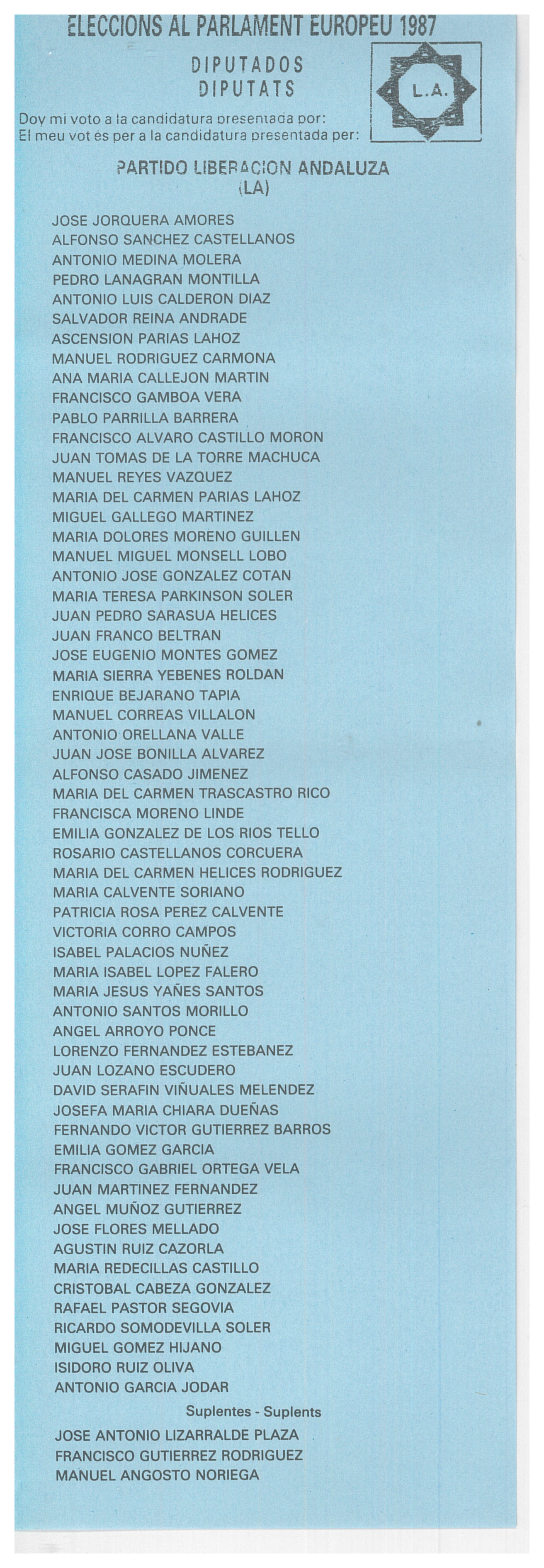 Papeleta electoral de Liberación Andaluza para las elecciones al Parlamento Europeo de 1987. Versión para la Comunidad Valenciana.